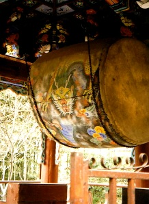 Traditionelle Glocke in Buddhist Tempel in Südkorea